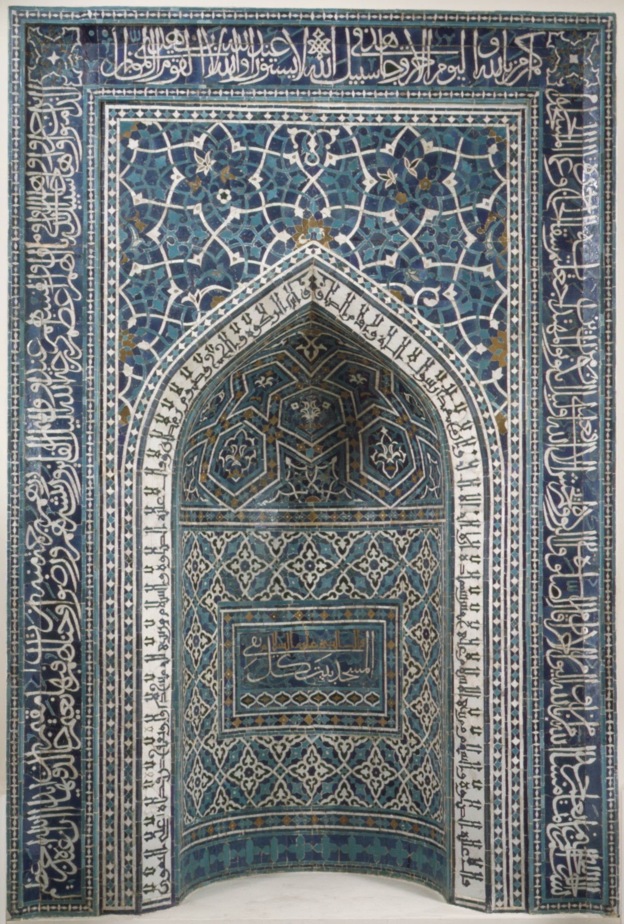 Mihrab; Ceramics